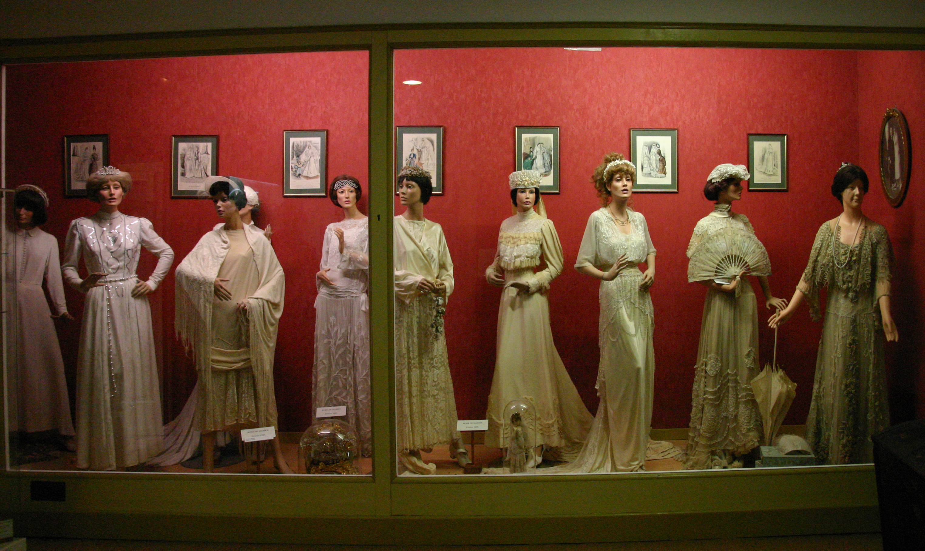 Château de Villesavin, Hochzeitsmuseum